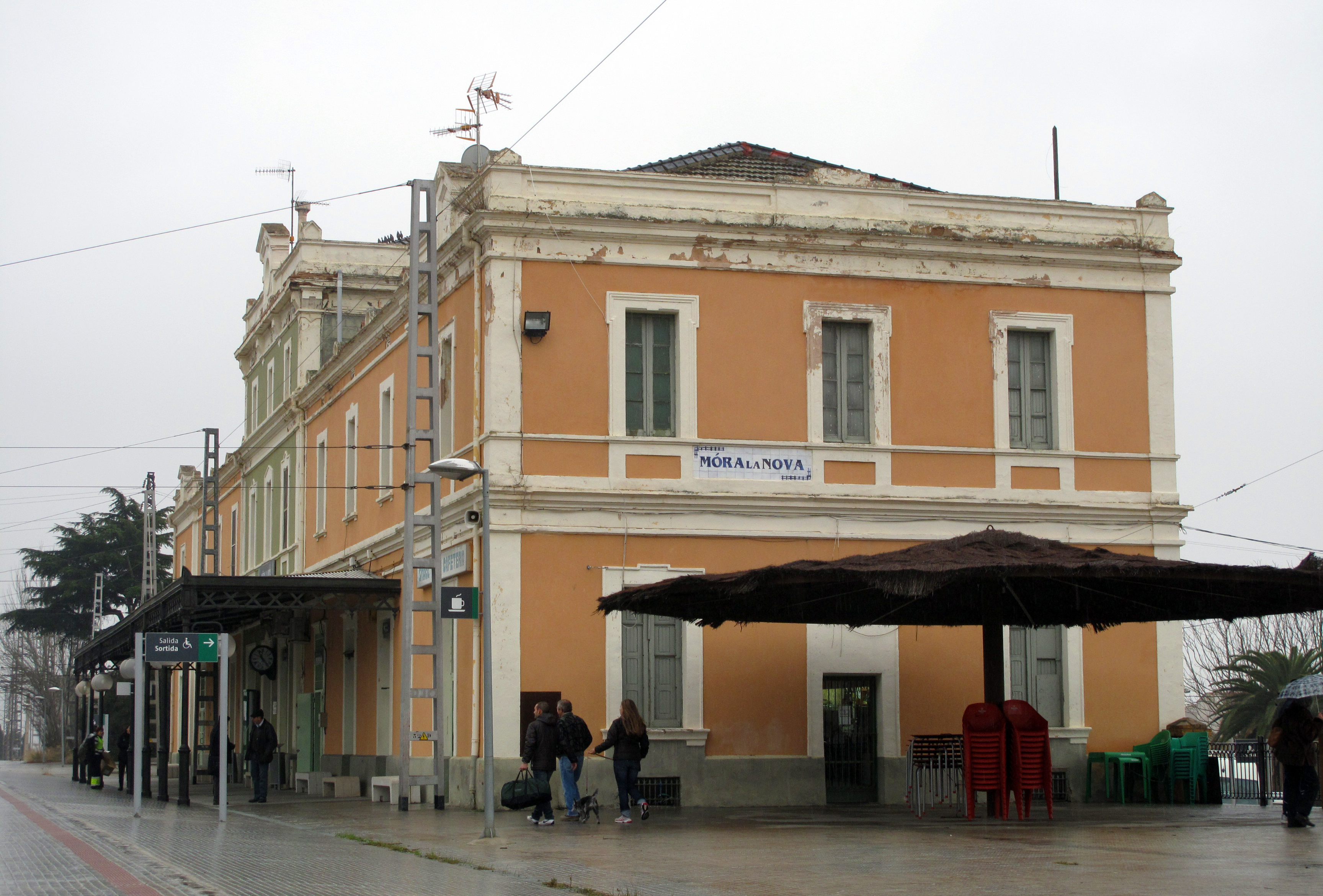 Estació de Móra la Nova